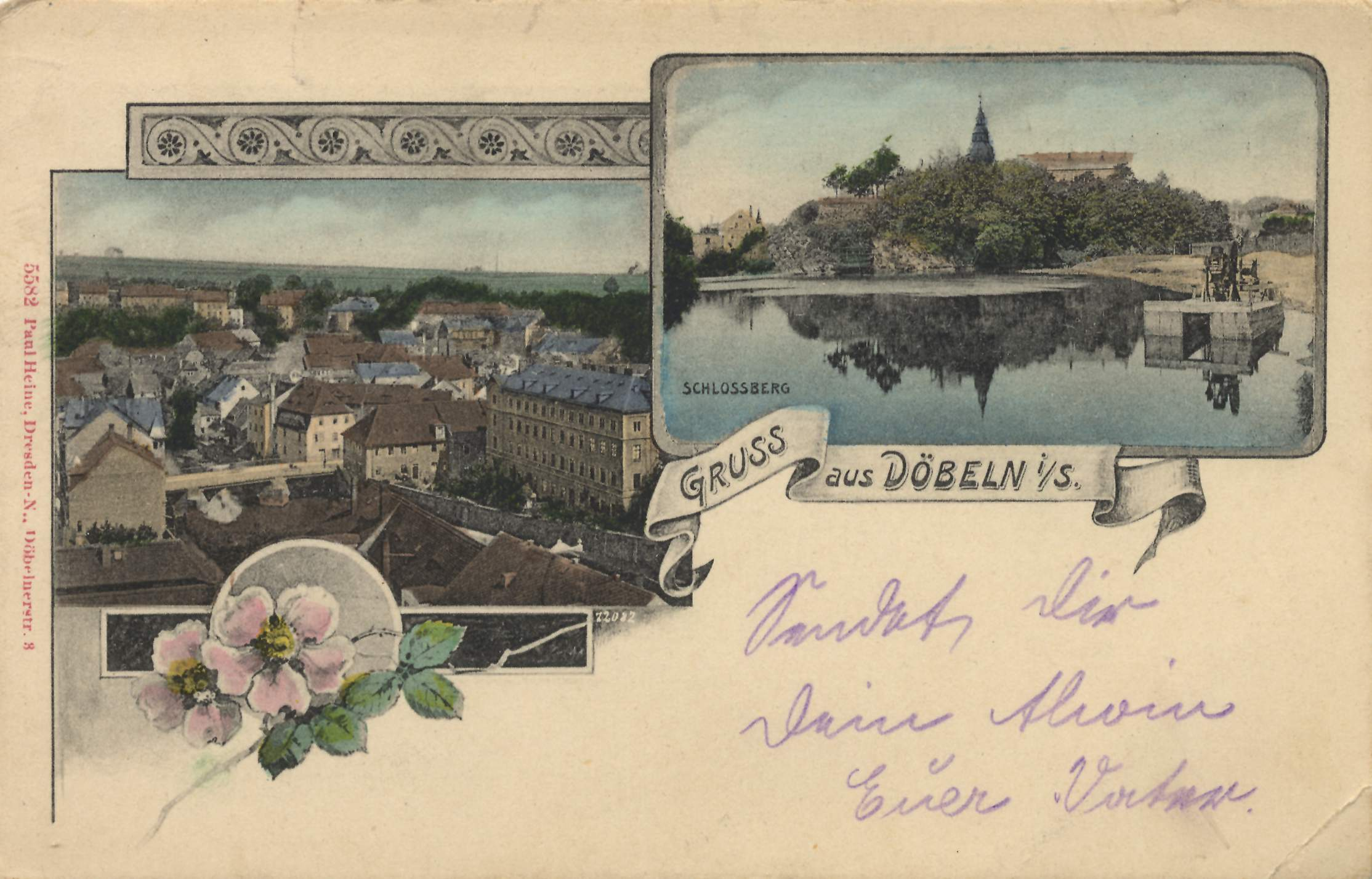 Stadtansicht; Schlossberg